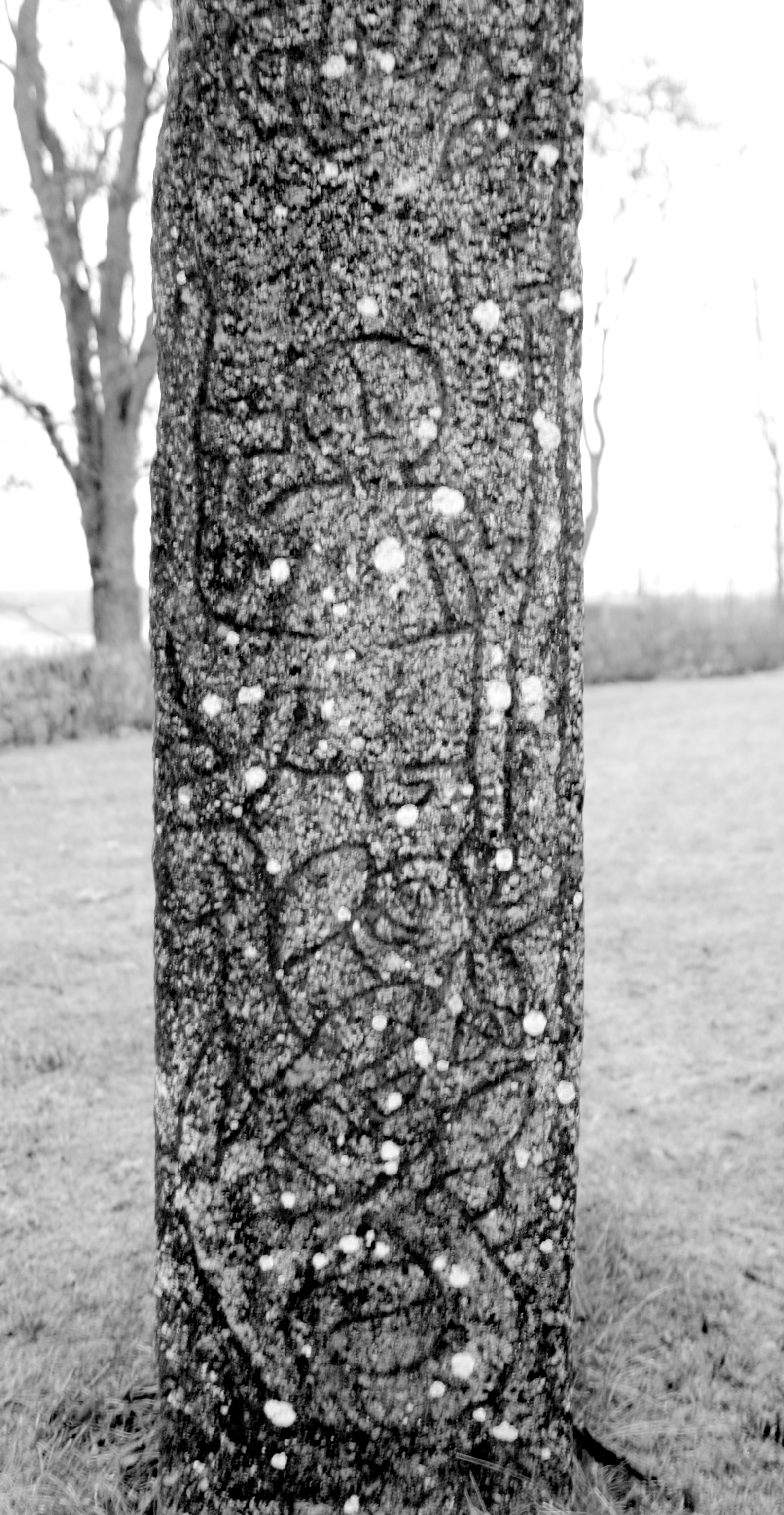 Upplands runinskrifter 1161, Altunastenen. (se även Image:Altuna U1161 andra sidorna 20050205.jpg)